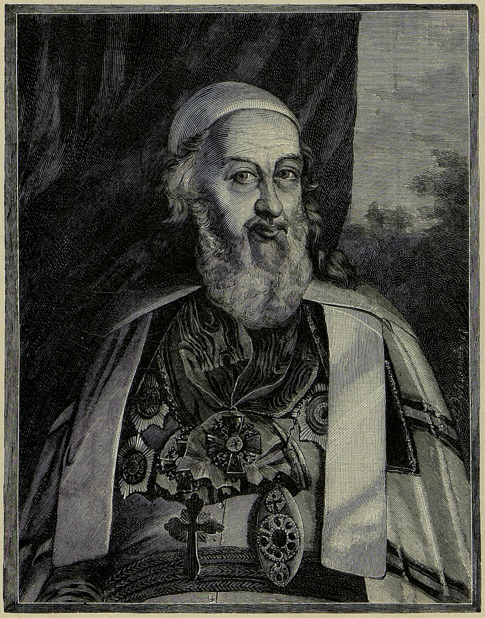 Беларуская (тарашкевіца): Партрэт Іраклія Лісоўскага (Irakli Lisoŭski)